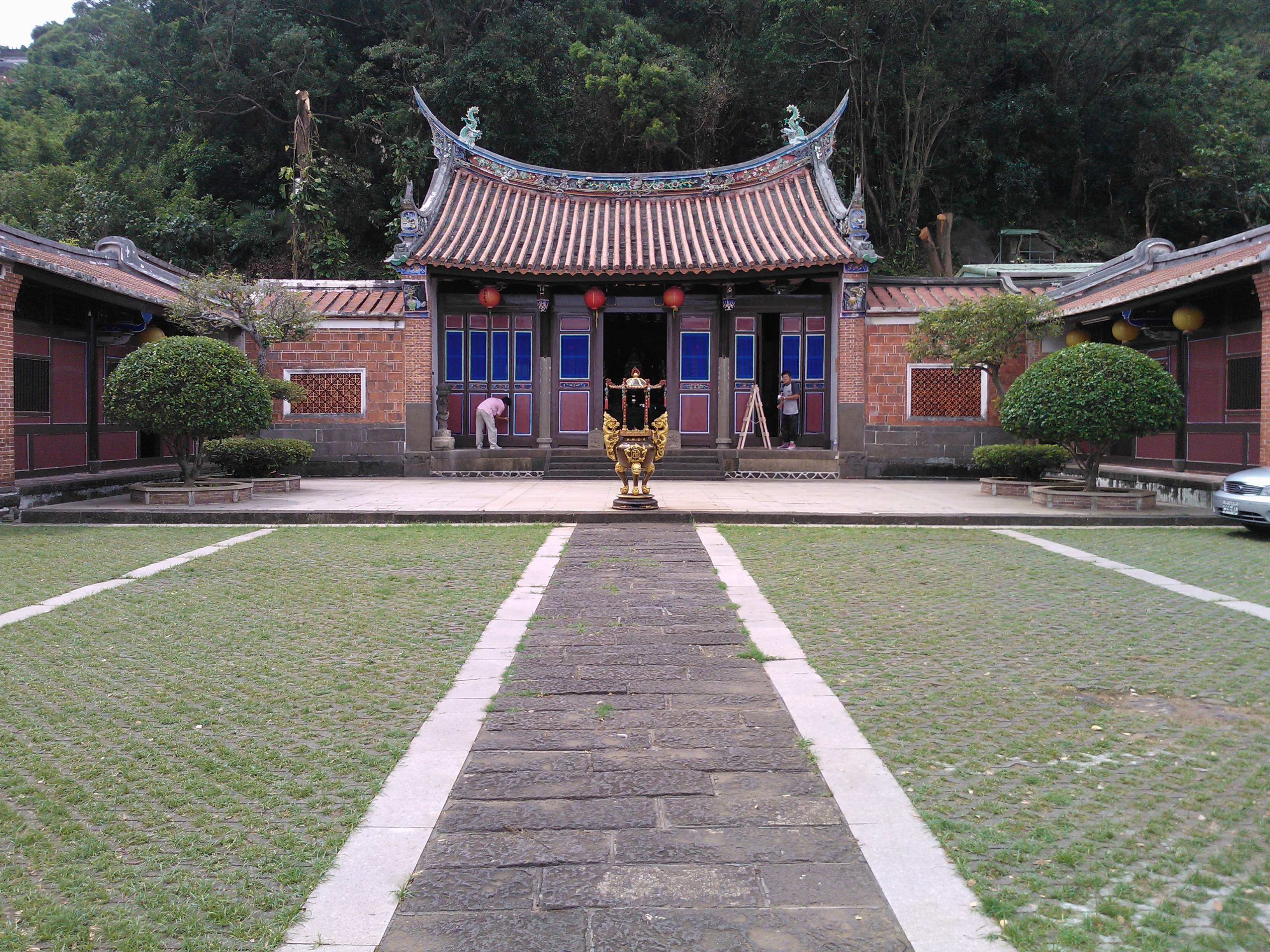 五股西雲寺